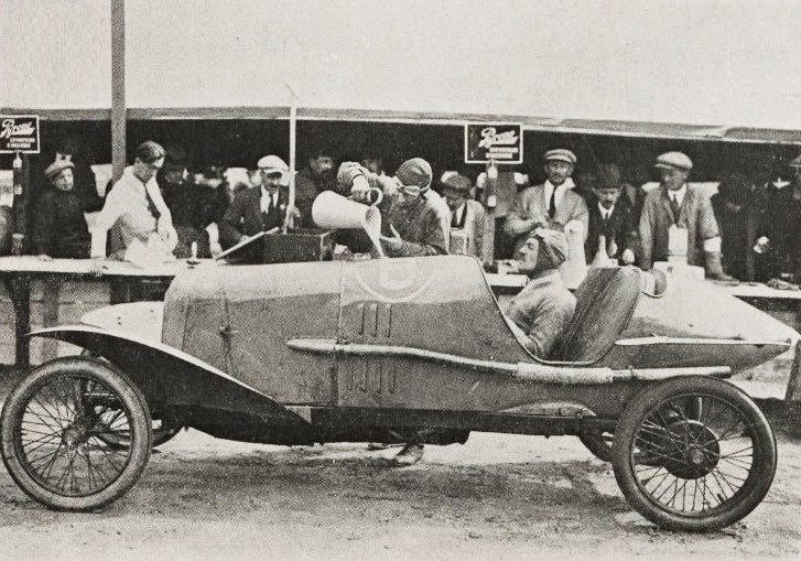 André Lombard sur Salmson, futur vainqueur du Grand Prix de l'U.M.F. Cyclecars 1921 - Le Sport Universel Illustré du 23 septembre 1921, p. 1098